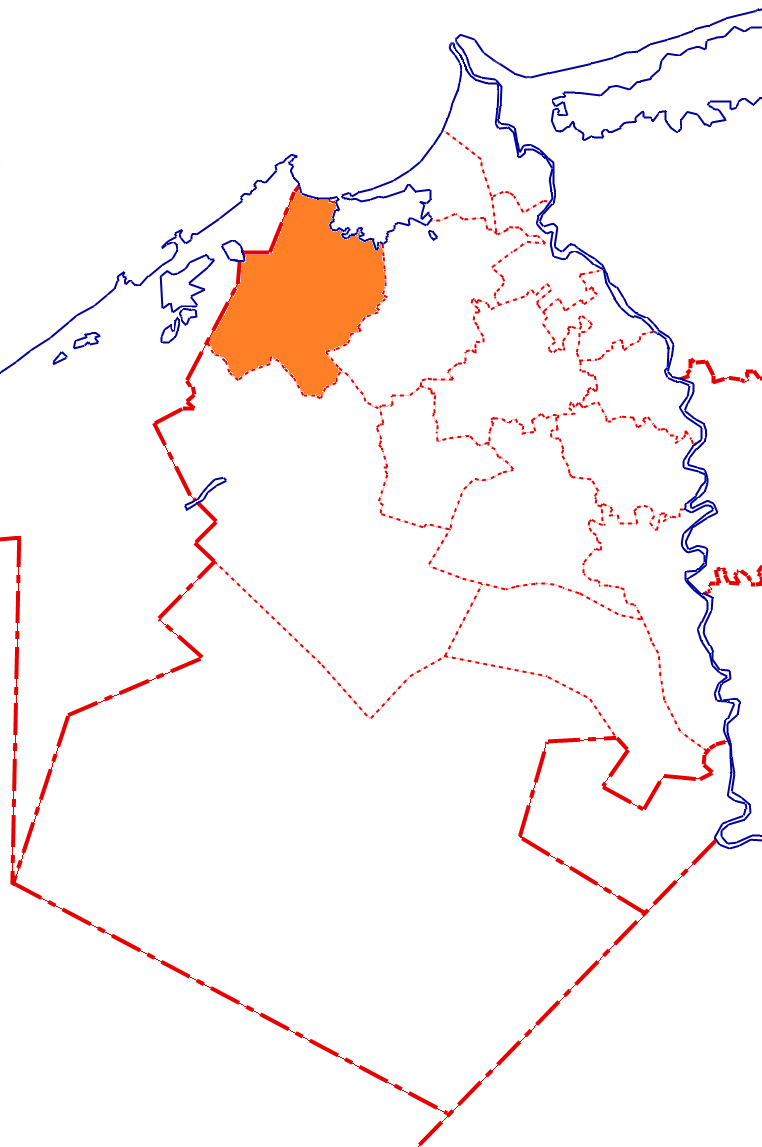 خريطة مركز كفر الدوار بالنسبة لمحافظة البحيرة، مصر.